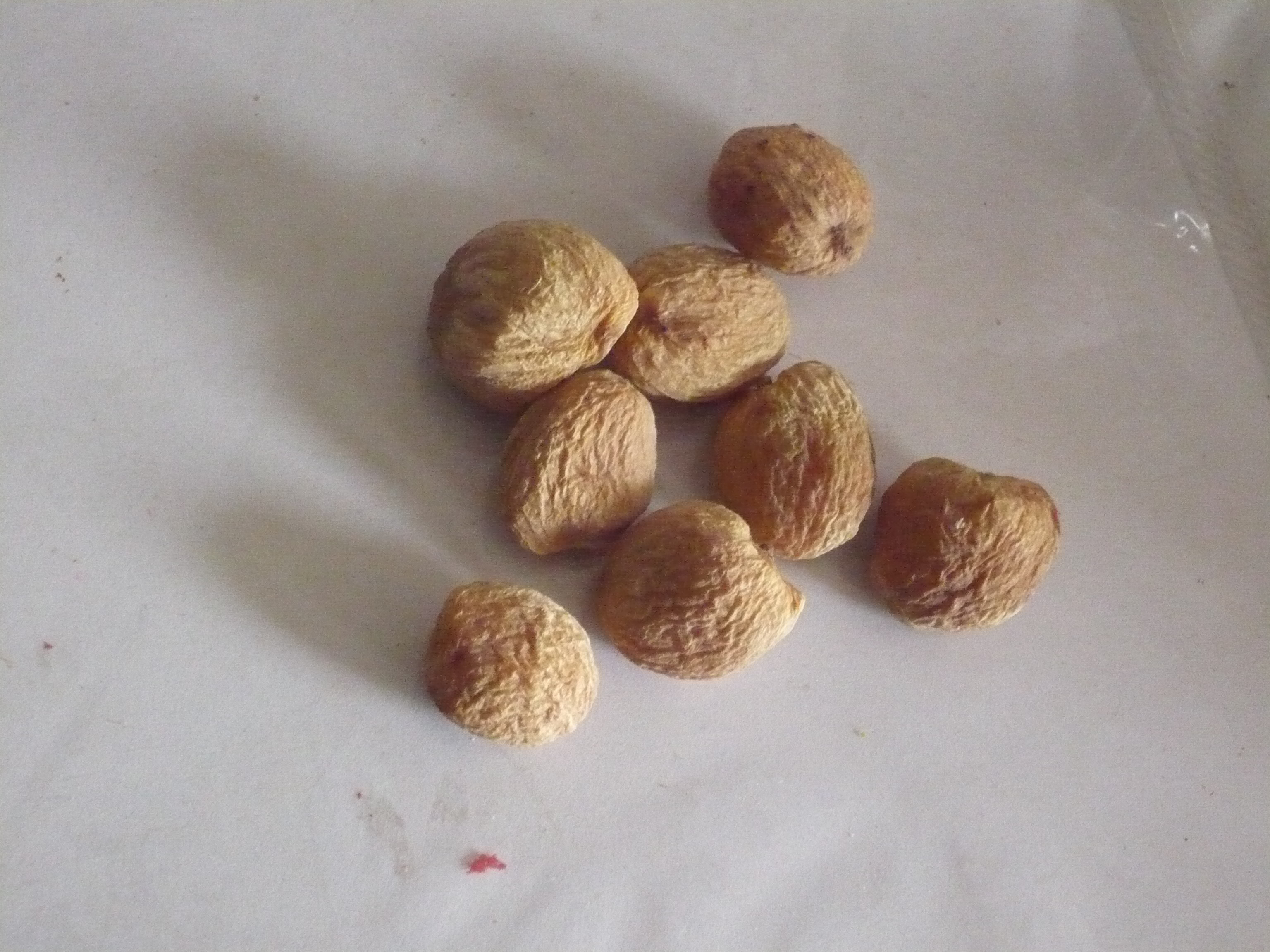 जरदाळू